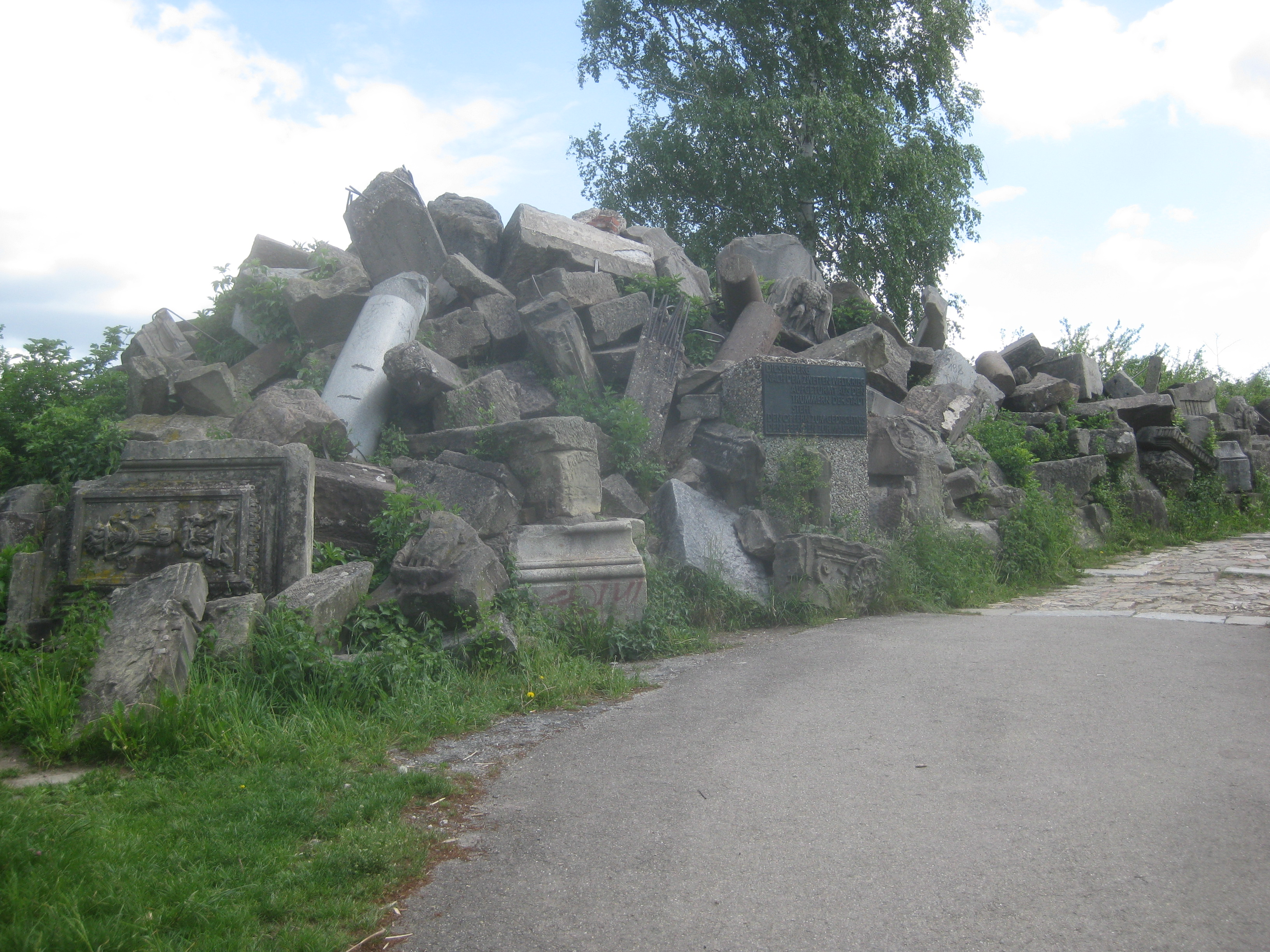 Trümmerhaufen aus dem Zweiten Weltkrieg auf dem Birkenkopf, einem Trümmerberg in Stuttgart.